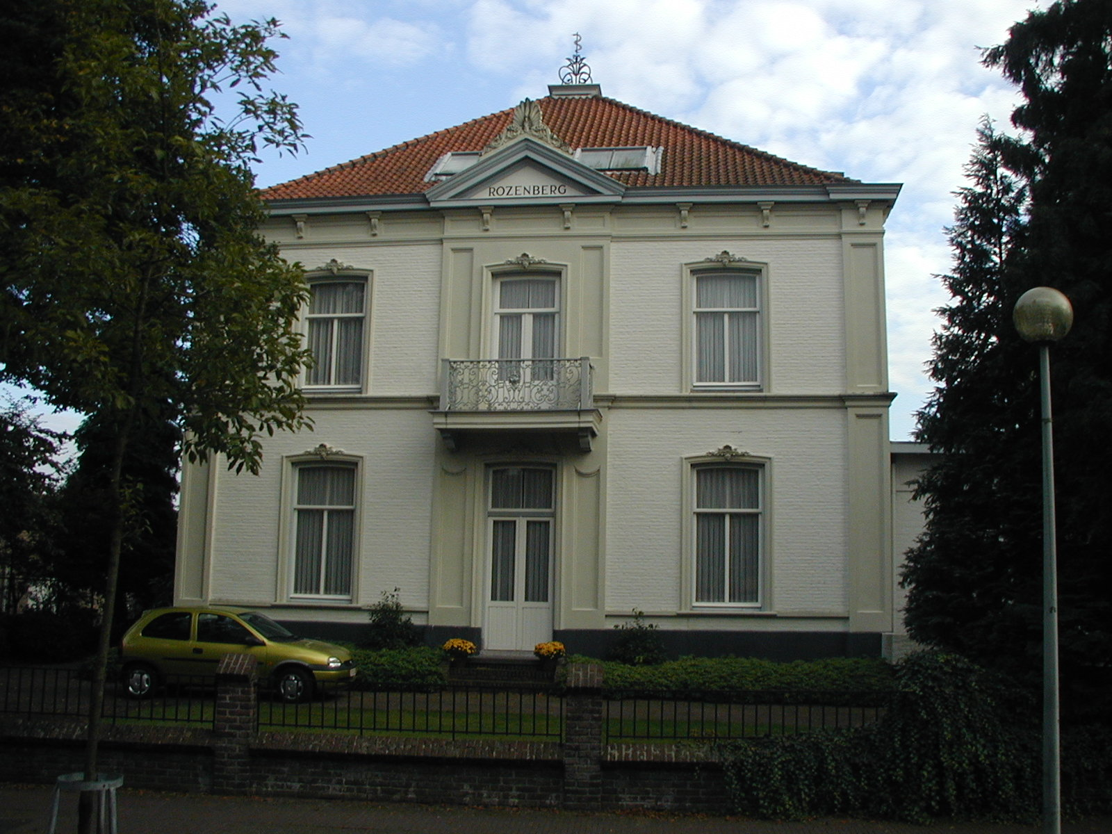 Foto zelf gemaakt op een onbekende datum in 2002. Afgebeeld is het herenhuis 'Rozenberg' aan de Stationsstraat in Deurne (NL).